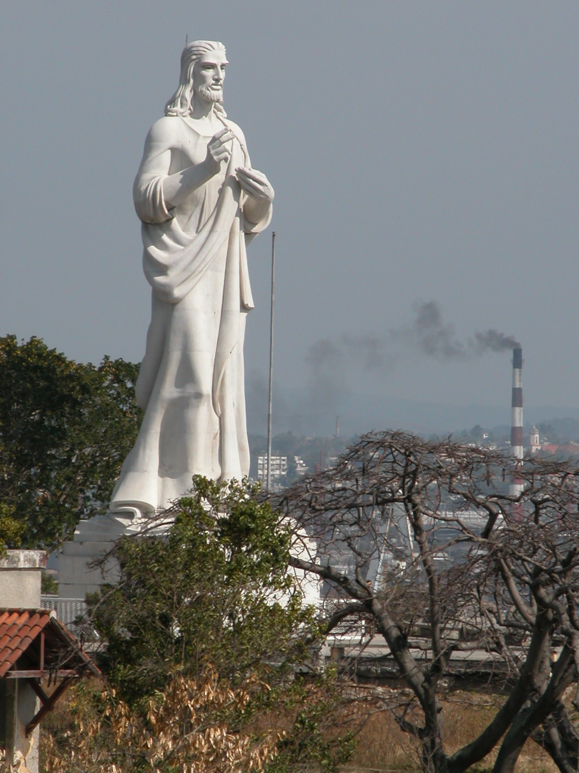 el cristo de la habana emilito